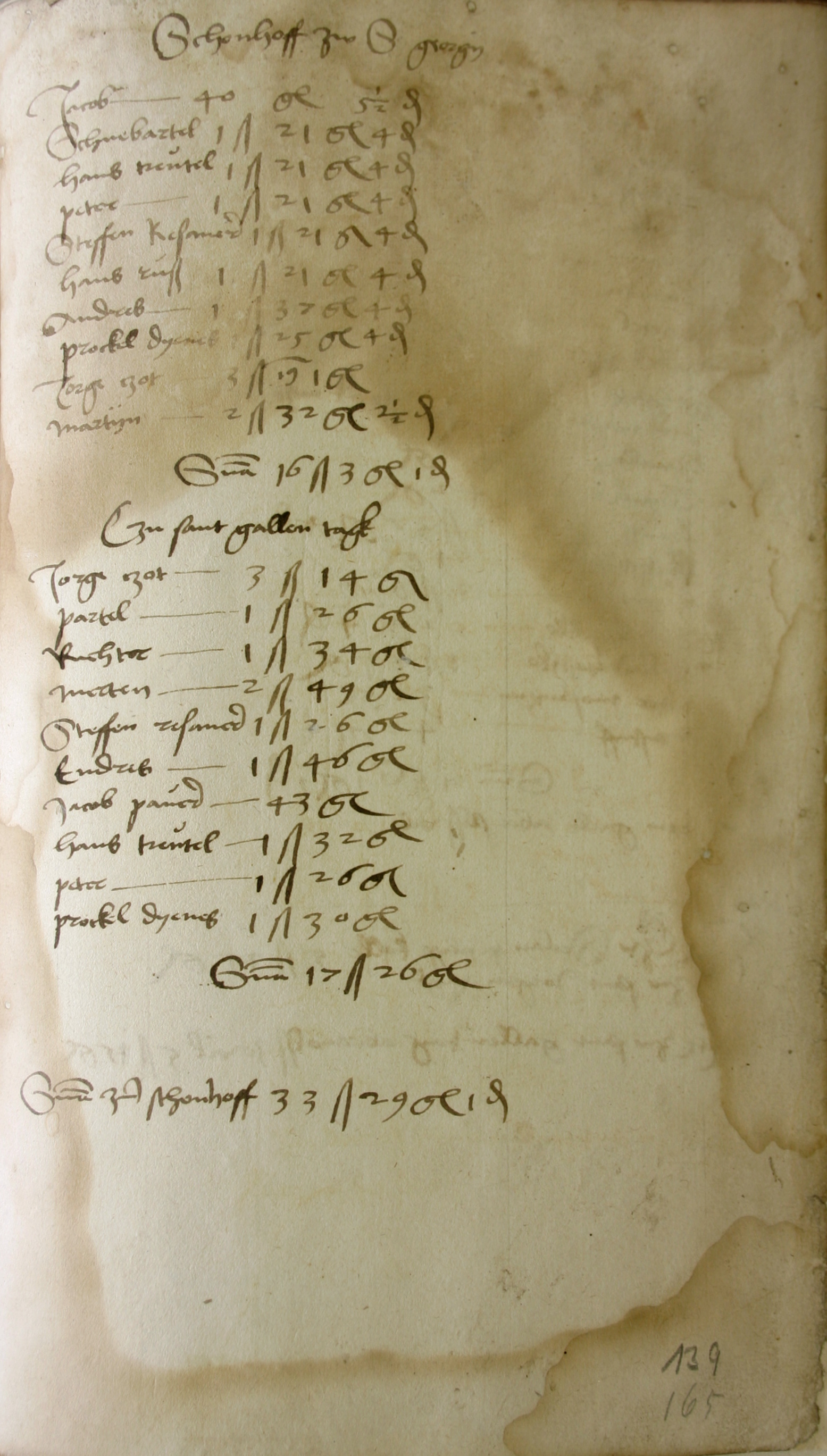 Abgabenverzeichnis für Bauern im Dorf Schonhof bei Kaden (Tschechien) aus dem Jahre 1518